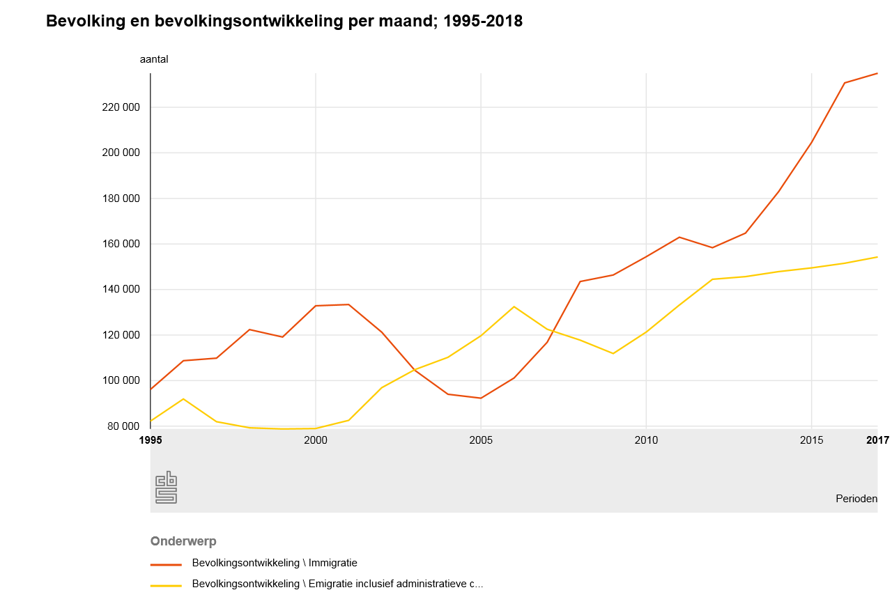 Bevolking per maand, immi- en emigratie vanaf 1995